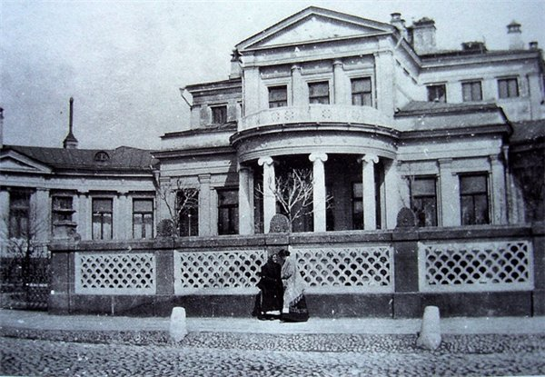 Особняк Морозовых на Смоленском бульваре в Москве